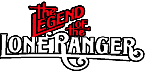 Gráfico diseñado con fines descriptivos.